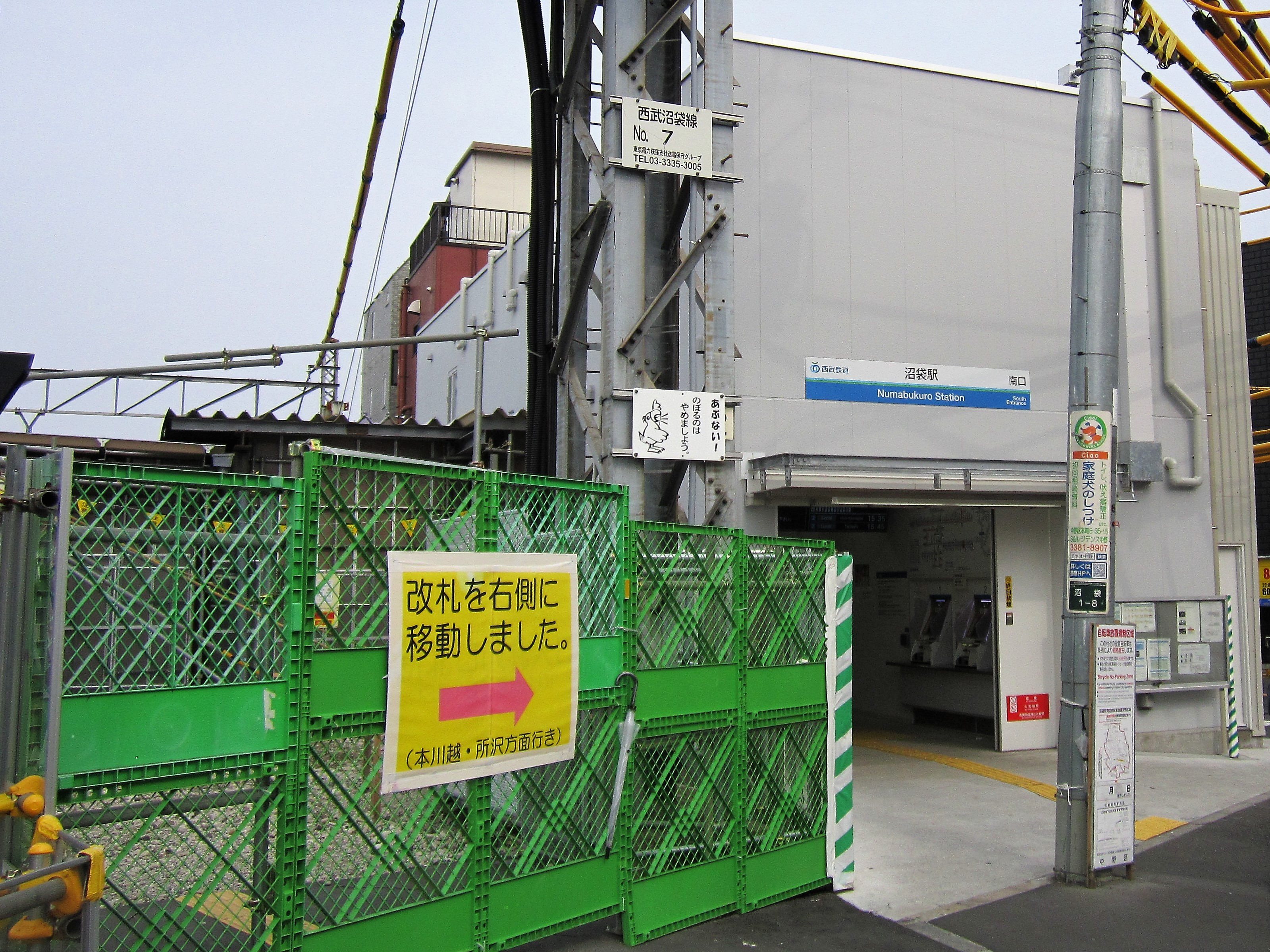 沼袋駅南口 仮駅舎（2019年7月）